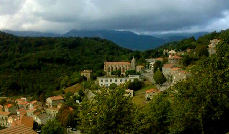 zicavo